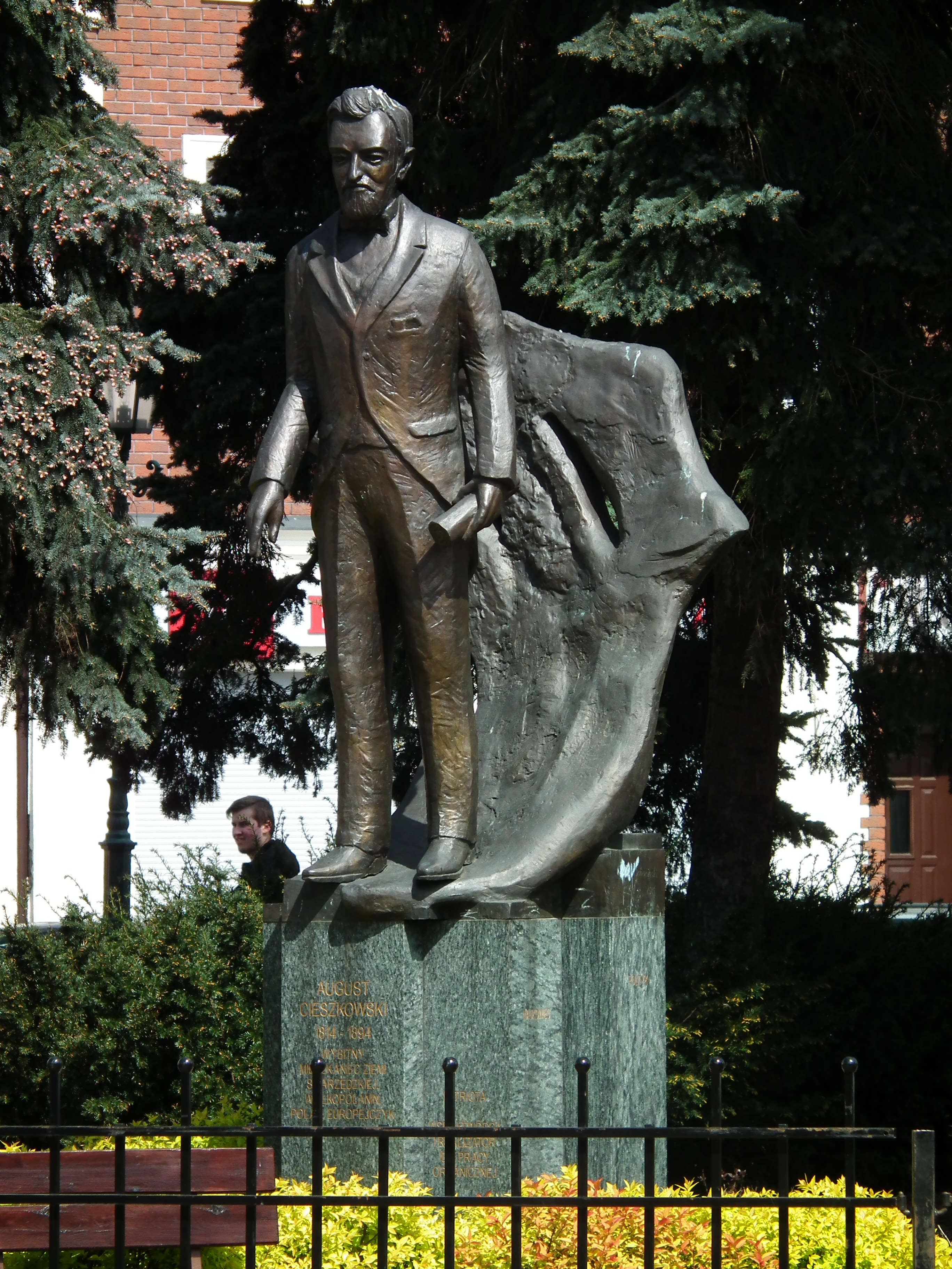 Pomnik A. Cieszkowskiego w Swarzędzu - Rynek.